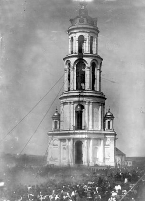 Воскресенский собор. Шуя. Подъём главного колокола 19 мая 1891